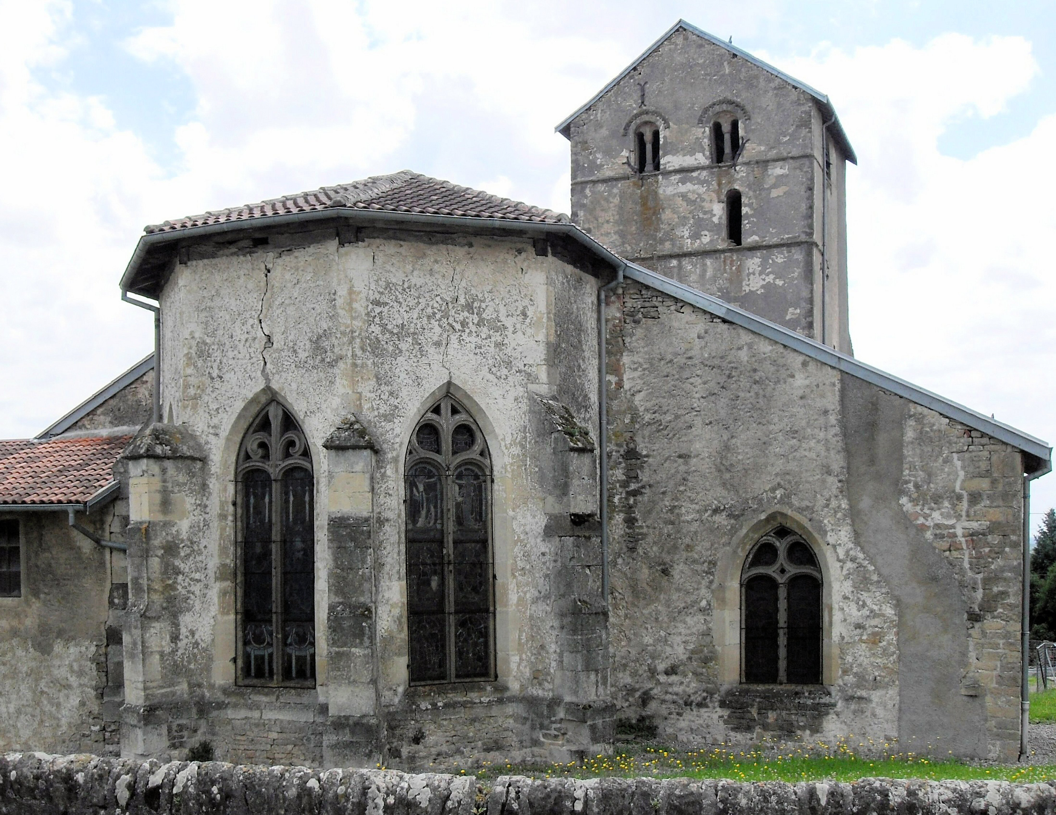 L'église Saint-Georges à Bouzemont